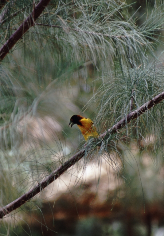 Dorfweber (Ploceus cucullatus) im Fuladu Camp